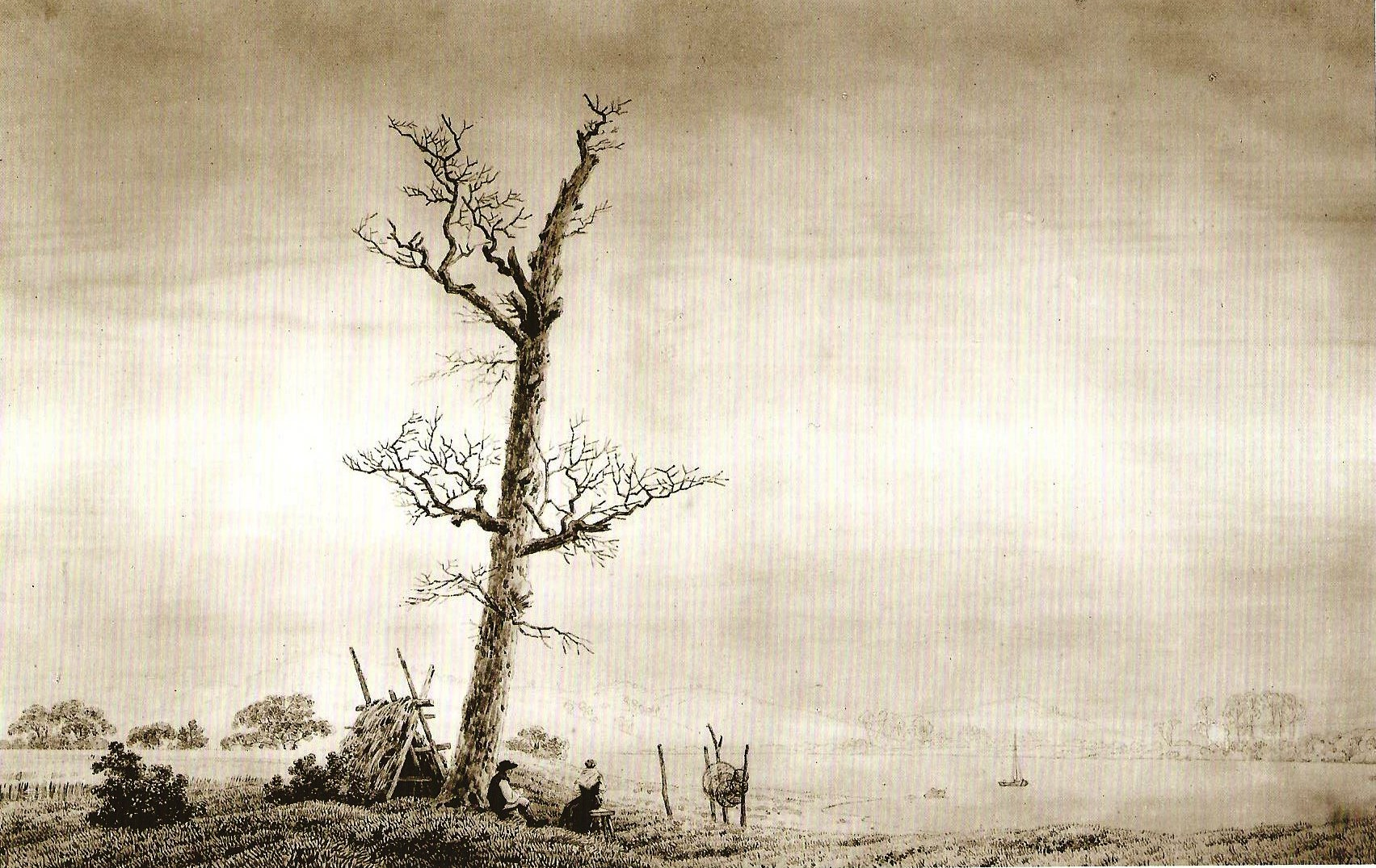 Herbstabend am See, um 1805, Sepia, 40,5 x 62 cm